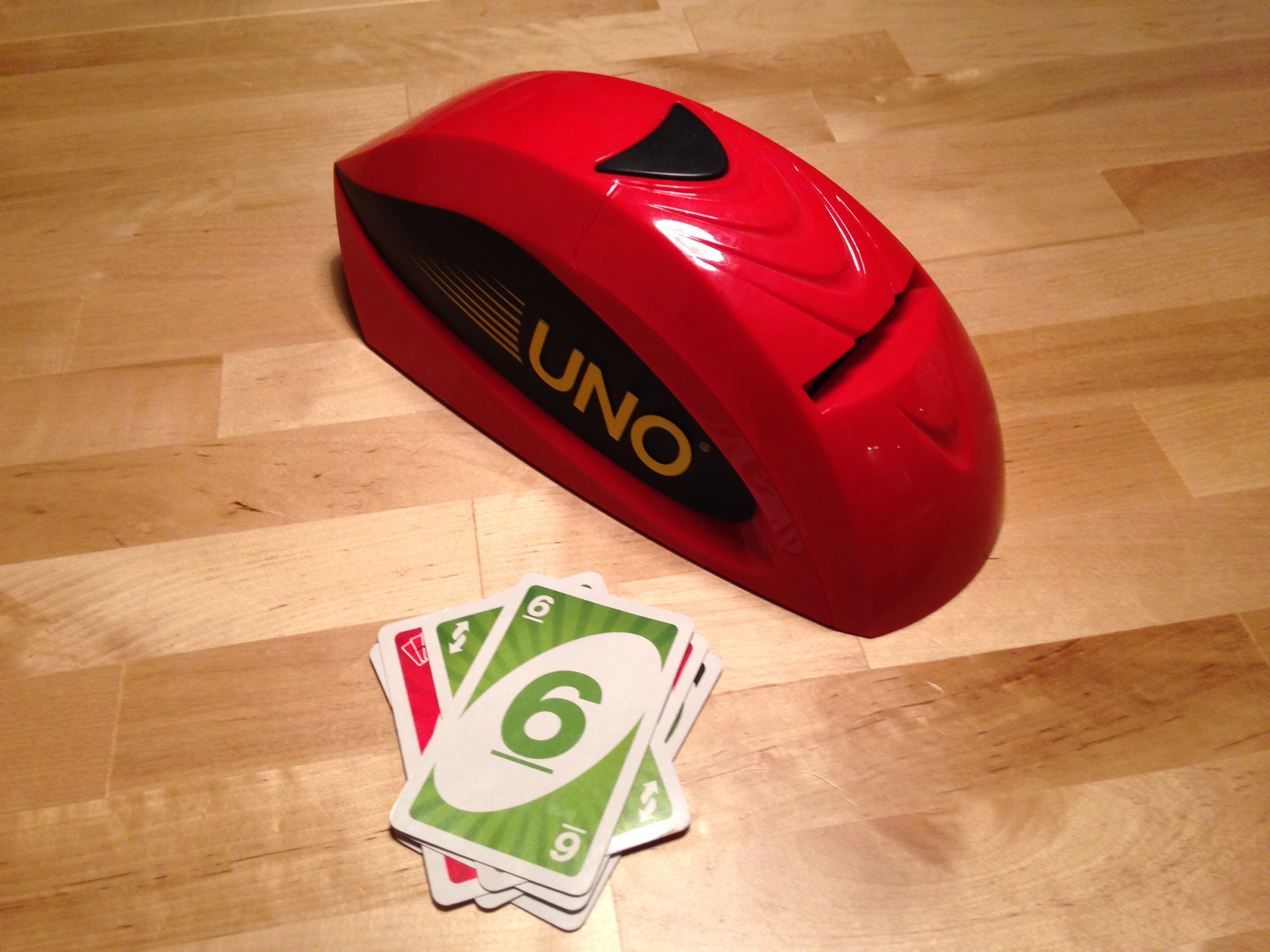 Uno Extreme